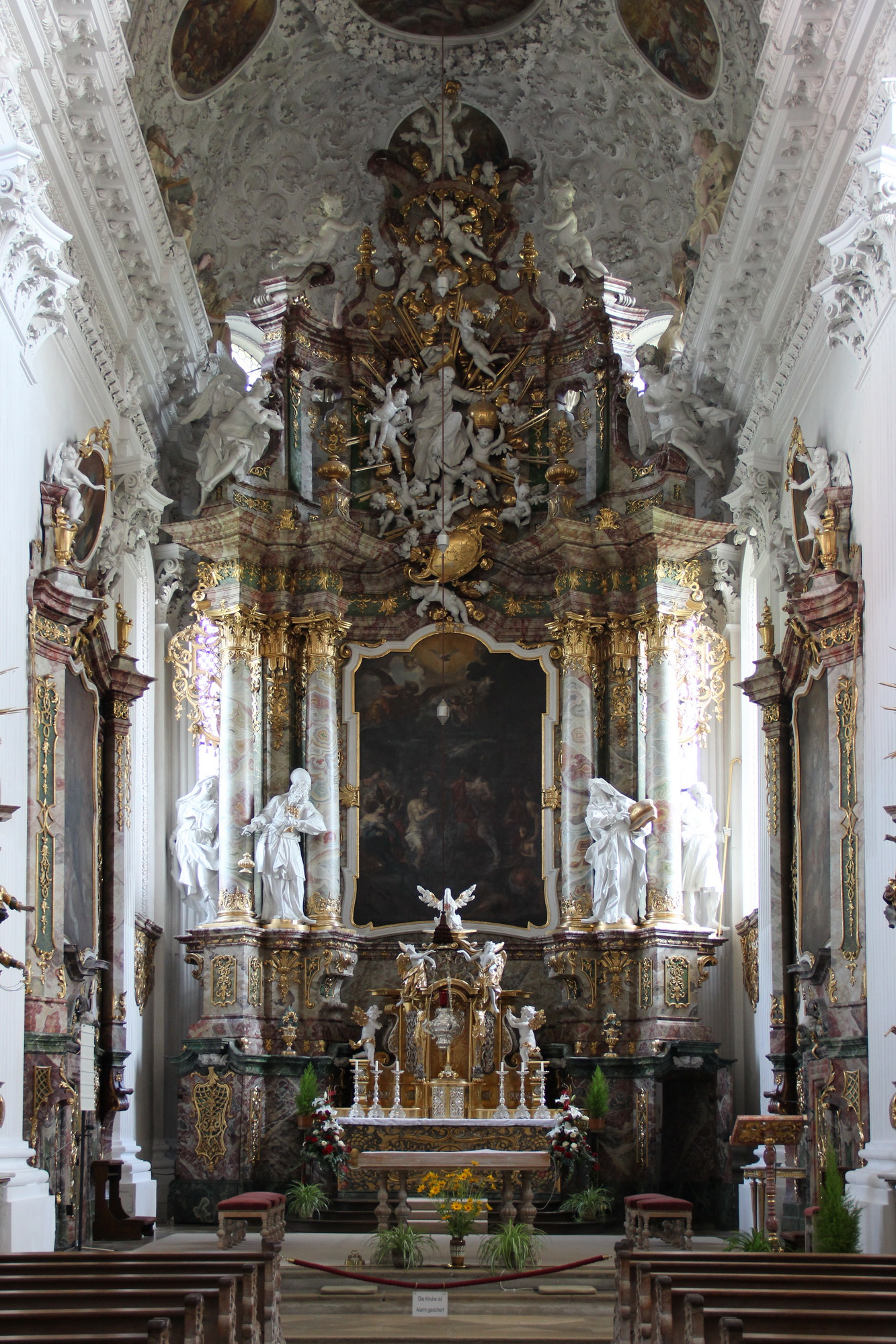 Kloster Holzen ist ein ehemaliges Kloster der Benediktinerinnen in Allmannshofen in Bayern in der Diözese Augsburg. Holzen Abbey is a Benedictine abbey near the village of Allmannshofen in Bavaria (approximately 15 kilometers south of Donauwörth), Germany